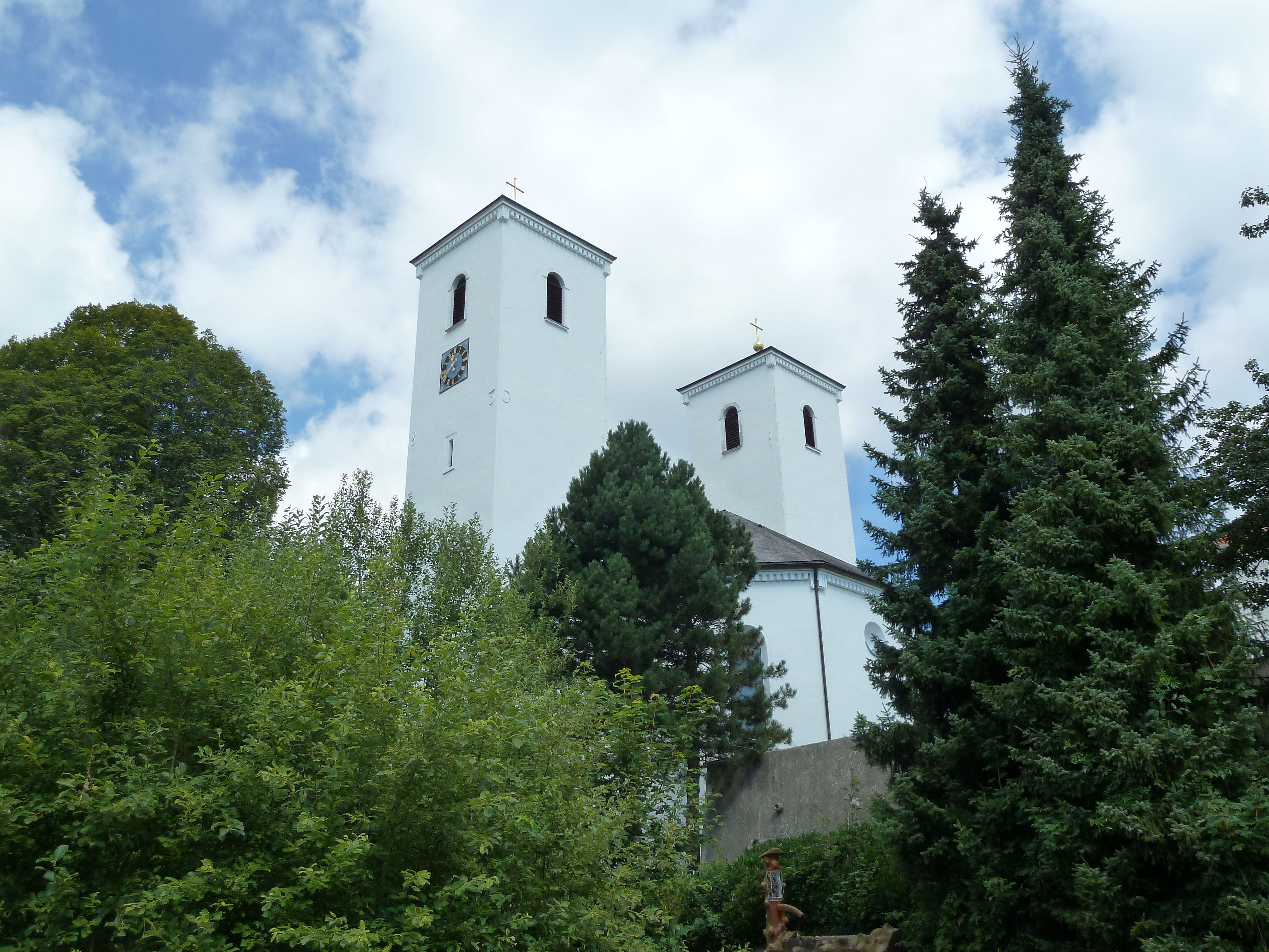 Kirche St. Zeno in Herrischried.